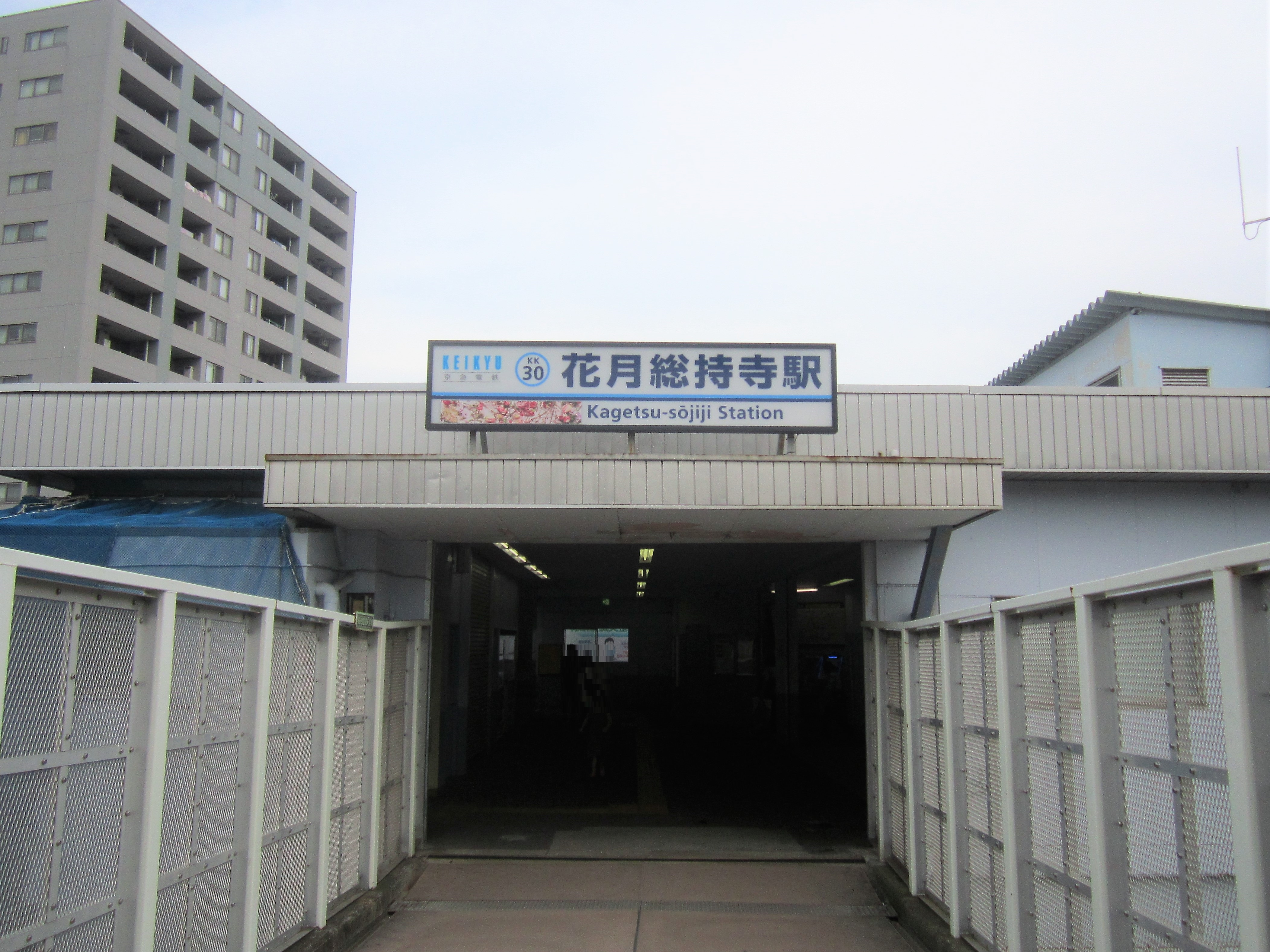 花月総持寺駅 北側入口 Canon PowerShot A2200